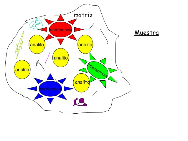 Esquema d'una mostra on veiem en la matriu i com afecta les interferències en l'analit